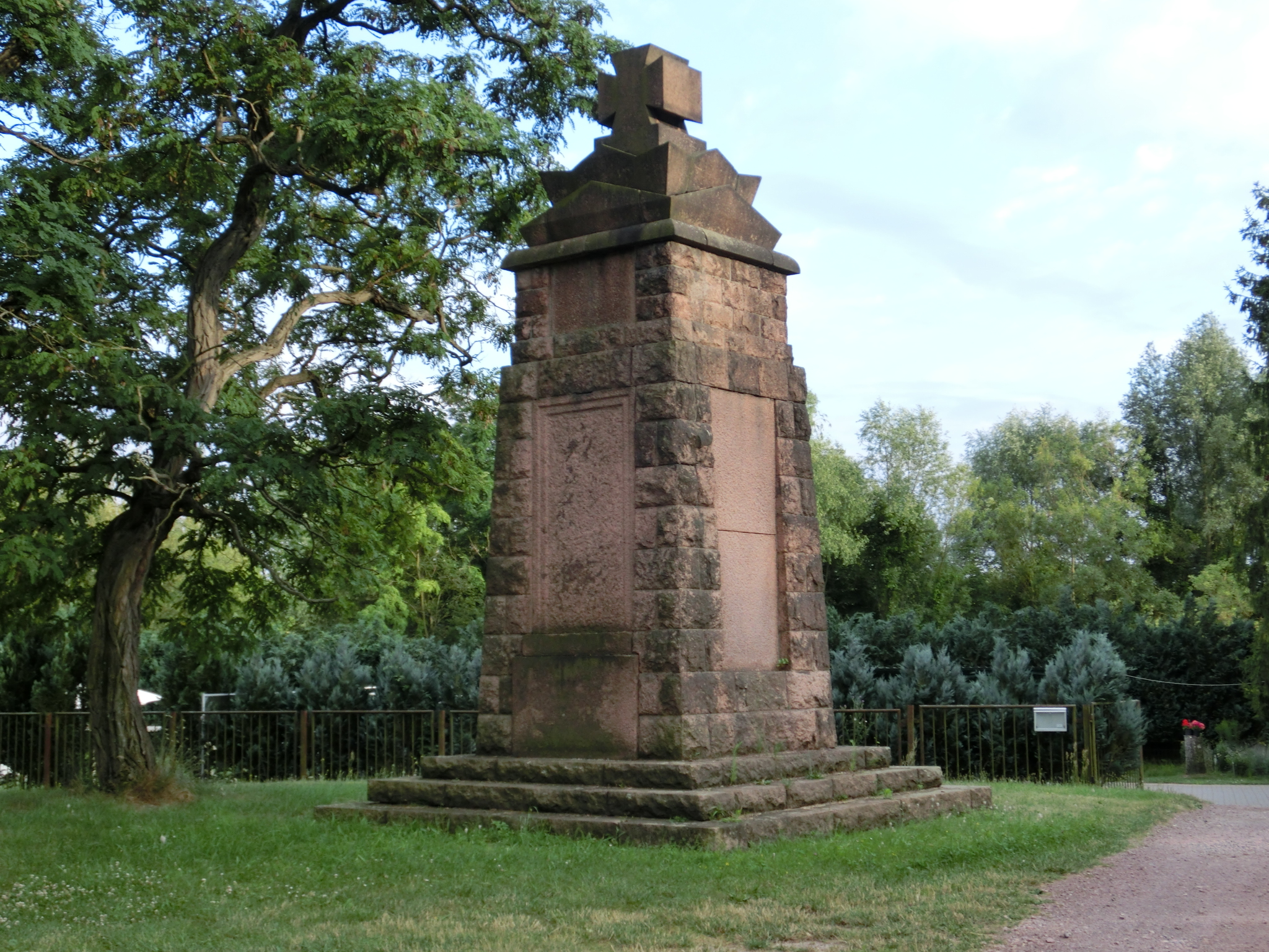 Kriegerdenkmal Bruckdorf - Adresse: Leipziger Chaussee, 06184 Kabelsketal-Dieskau (?) - ID=094 97104 sowohl in der Denkmalliste Halle bei den Kleindenkmalen Bruckdorf (wie auch im Denkmalverzeichnis Halle unter Zieglerstraße, Bruckdorf) als auch in der Denkmalliste Kabelsketal (Dieskau), unklare Zuordnung bei Wikip.